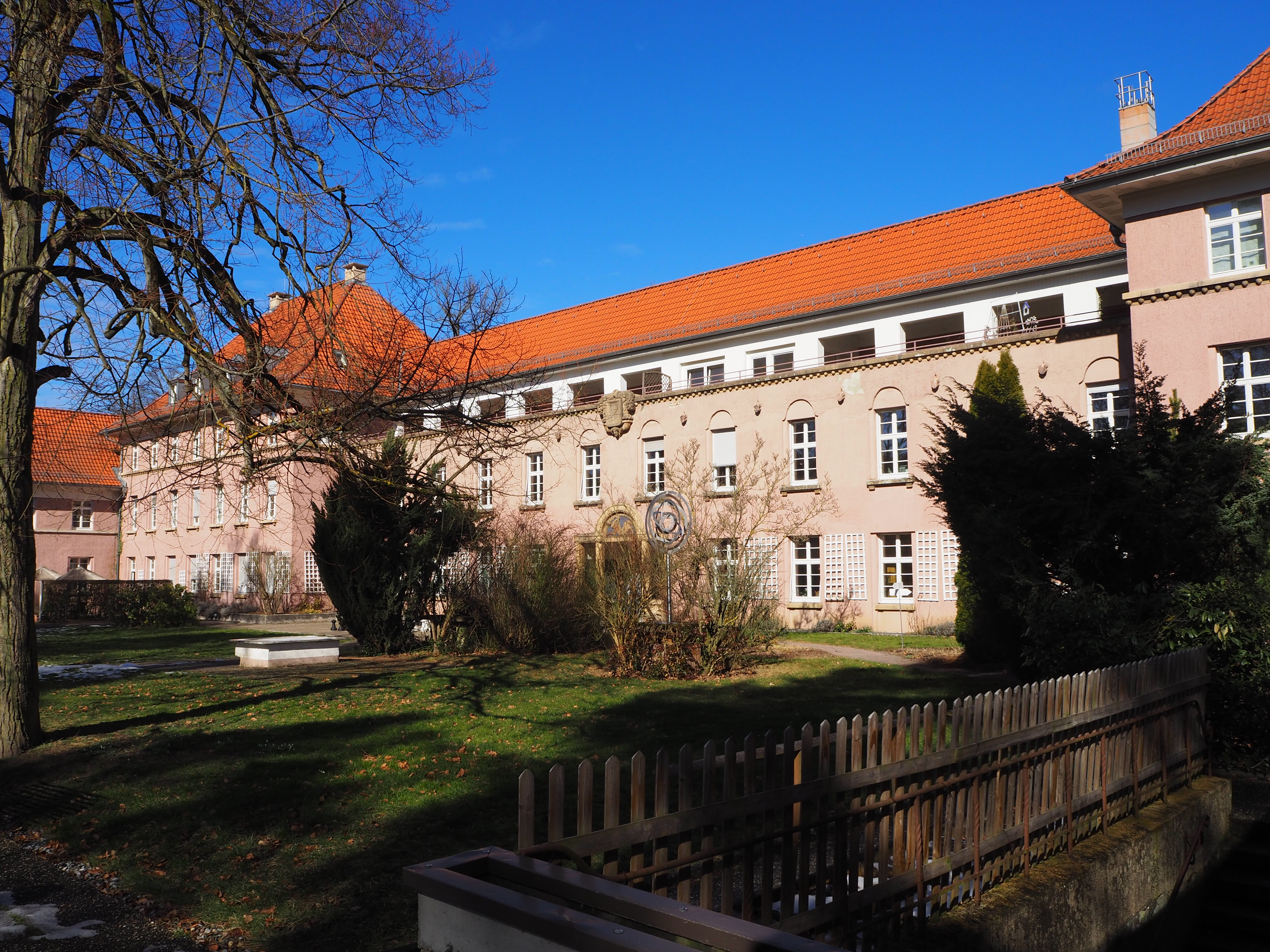 Rudolf-Sophien-Stift in Stuttgart, eine psychiatrische Klinik